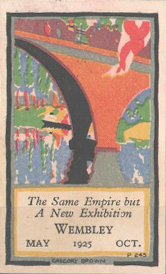 In Verbindung mit der Messe des britischen Kolonialreiches (British Empire Exhibition) veröffentlichte Ansichtskarte